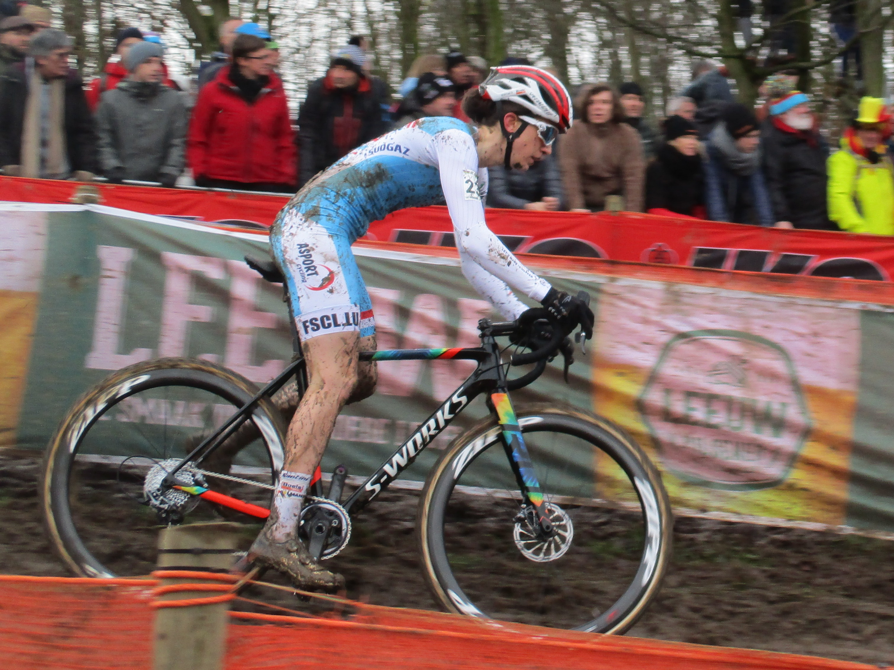 Wereldkampioenschappen Veldrijden op 3 en 4 februari 2018 op de Cauberg in Valkenburg, Limburg, Nederland. Wedstrijd van de vrouwen elite. Ronde 3 van 4.